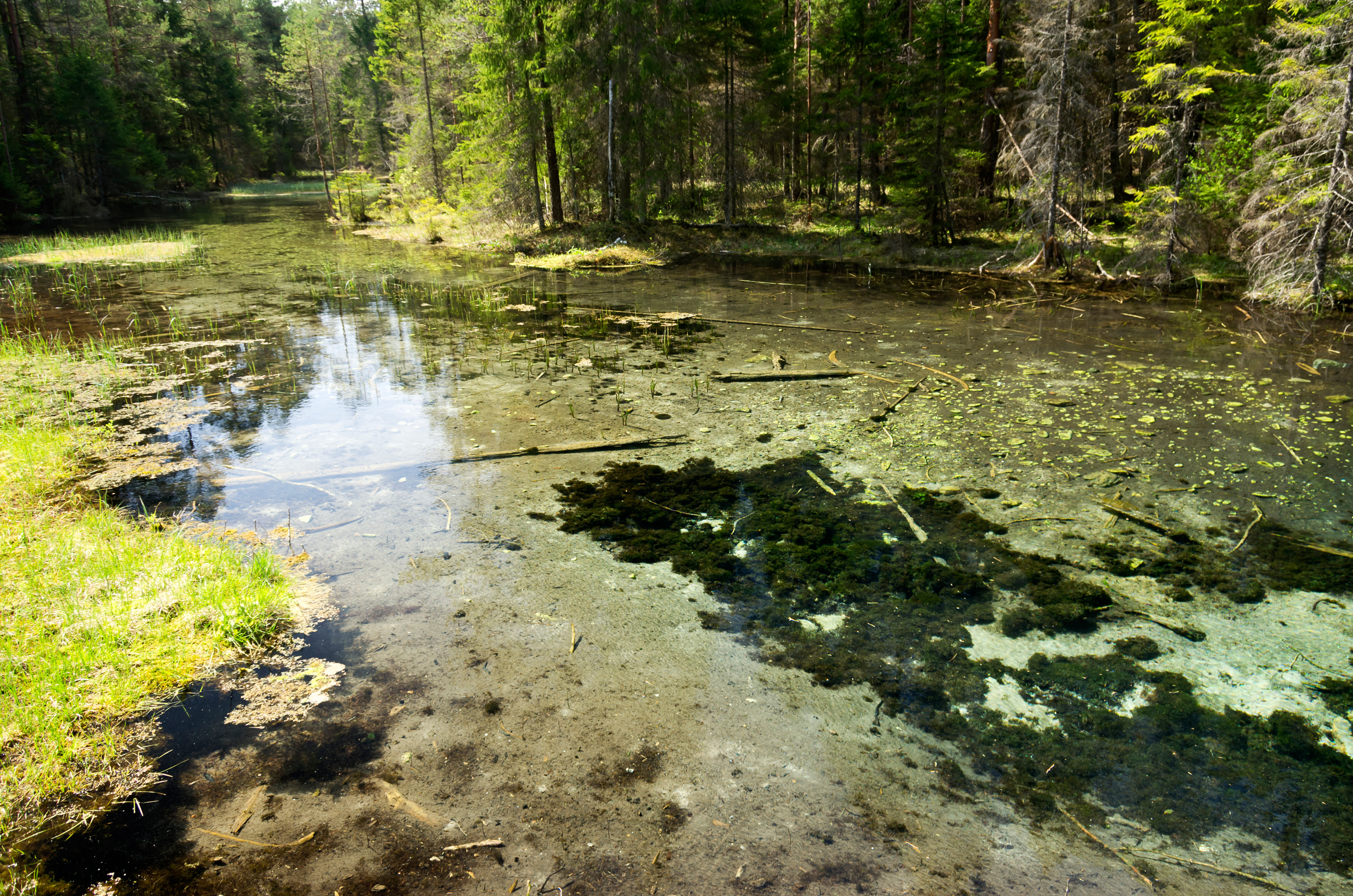 Oostriku järvik, Endla looduskaitseala